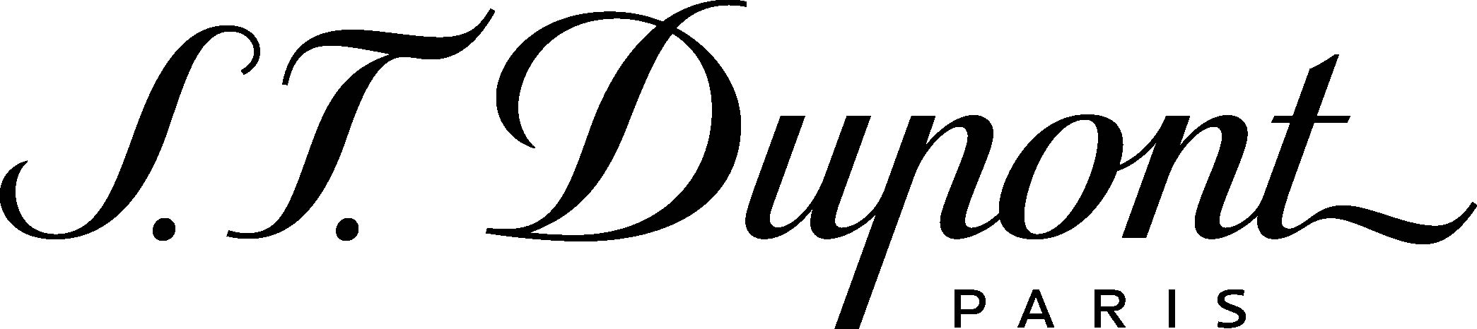 Logo de la firme S. T. Dupont.